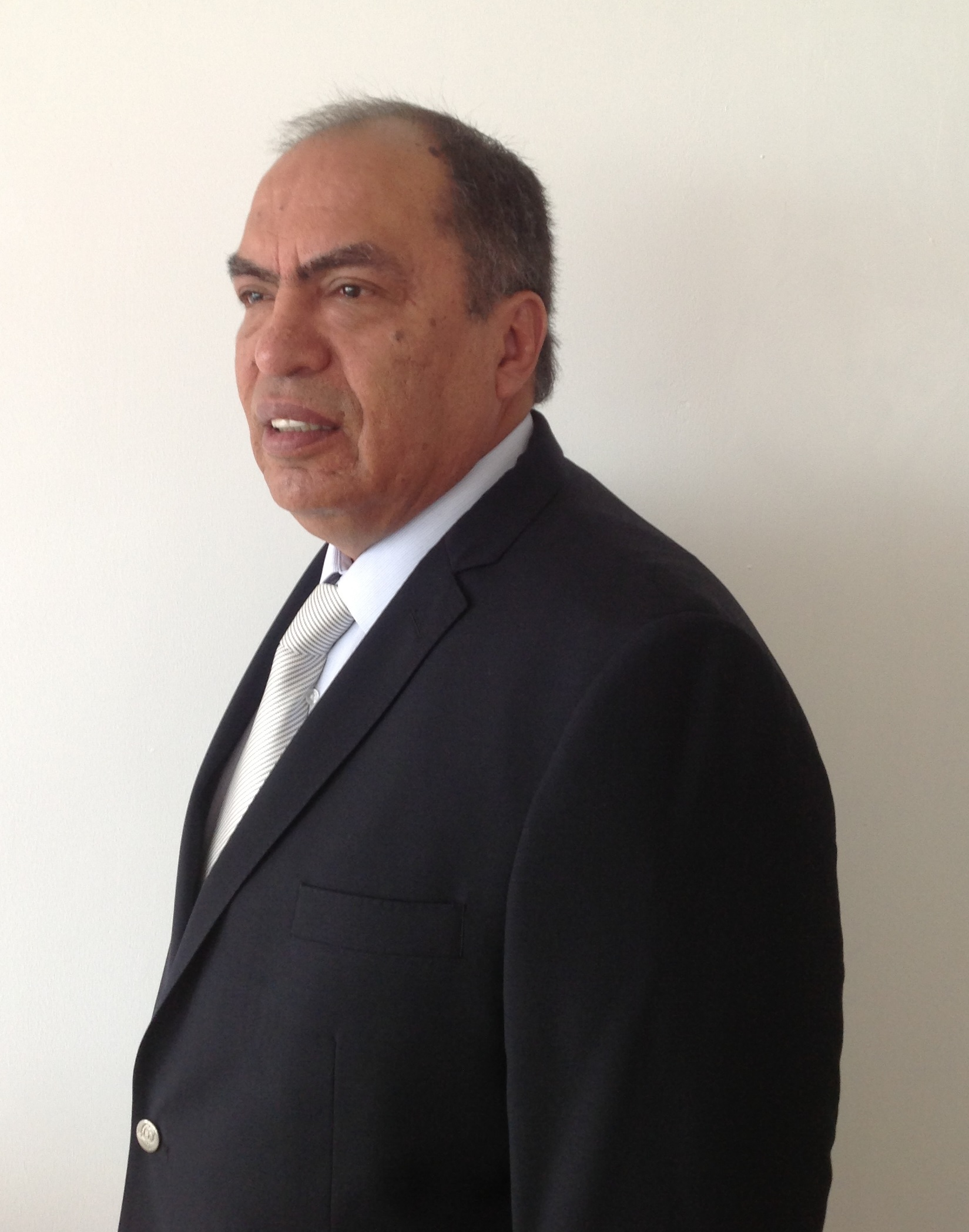 Escritor mexicano